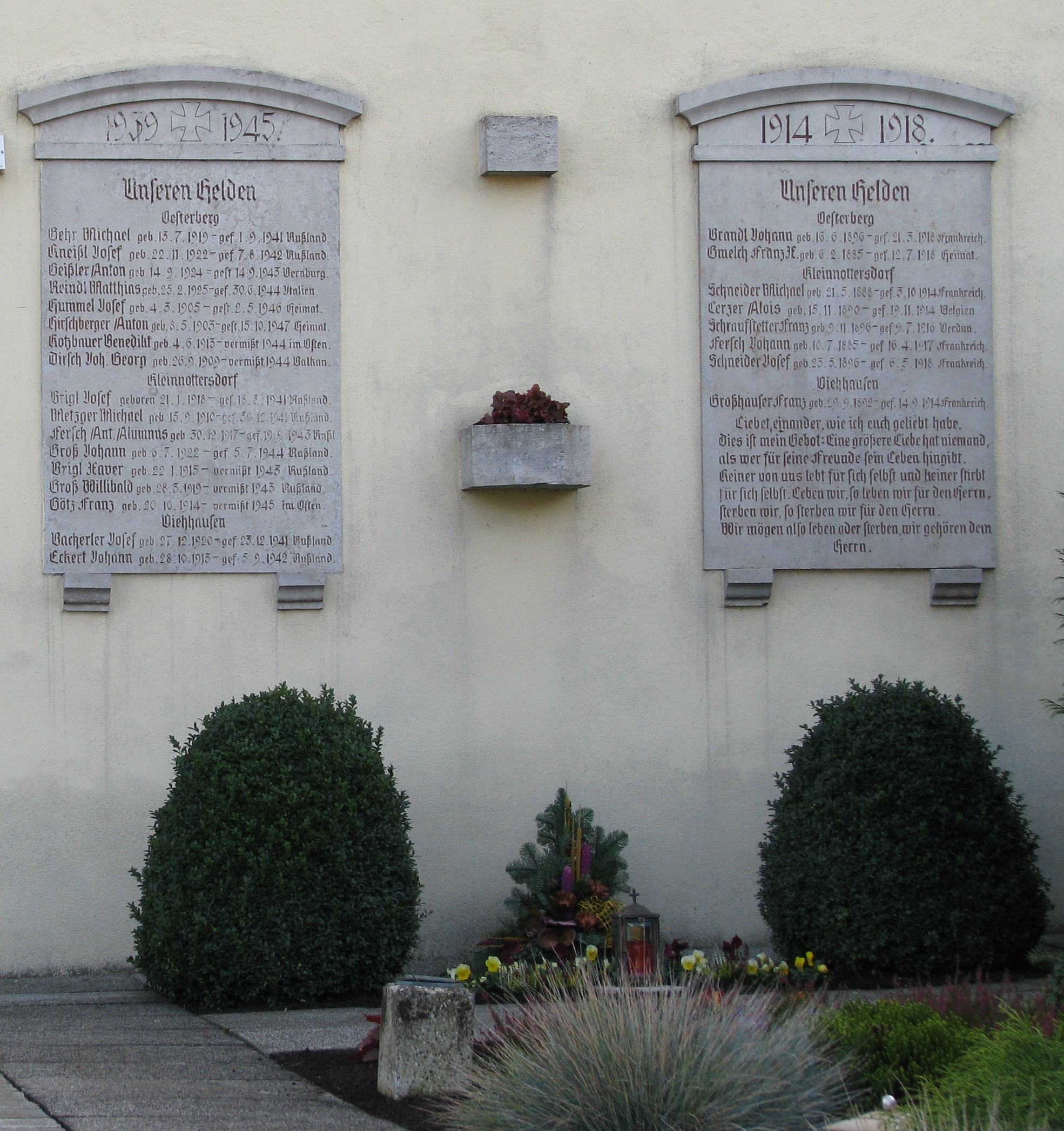 Österberg, Ortsteil von Greding im mittelfränkischen Landkreis Roth in Bayern, Kriegerdenkmal an der Ortskirche St. Stephan